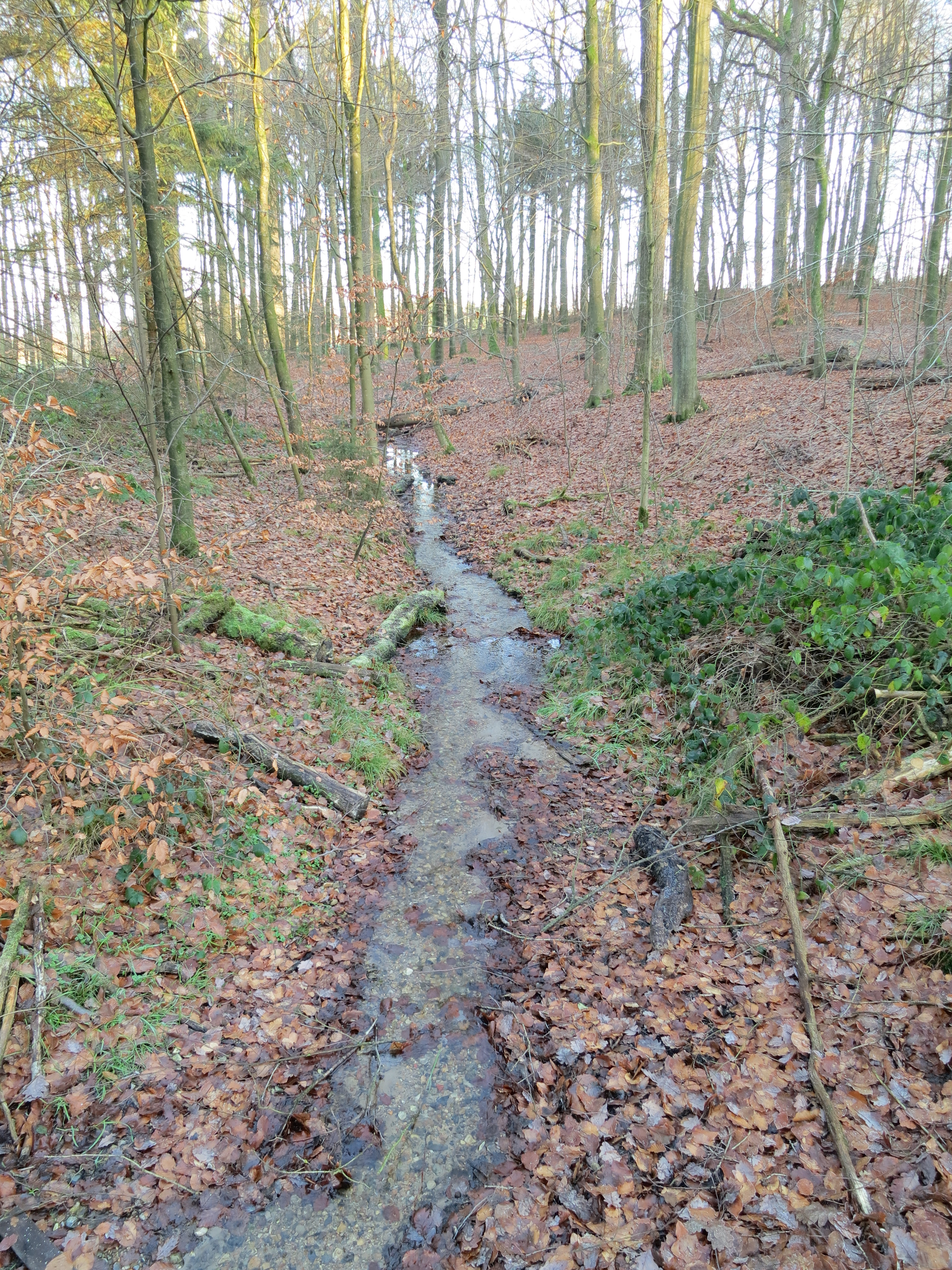 Der Schmabek im Trotzenburger Wald (Itzehoer Stadtforst).